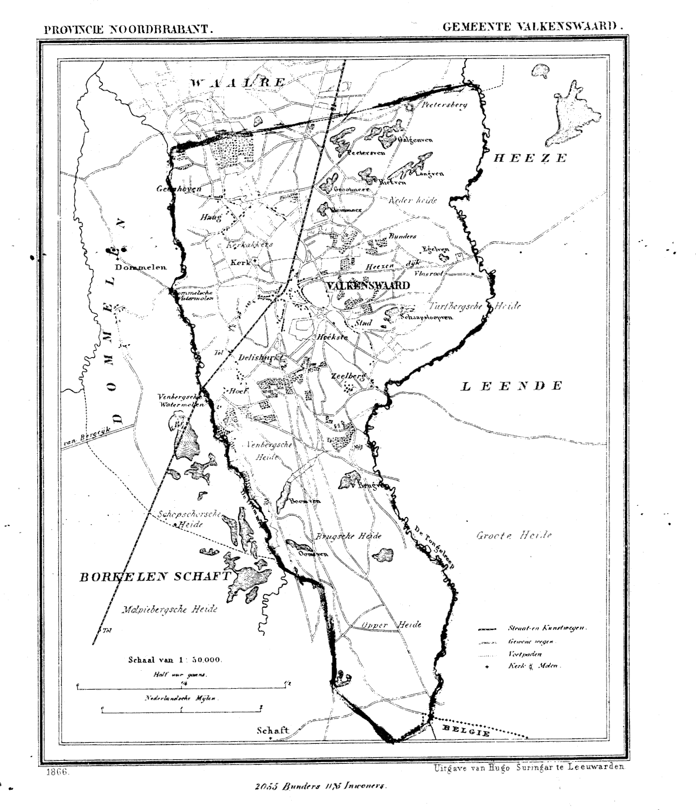 Nederland, Noord-Brabant, Gemeente Valkenswaard